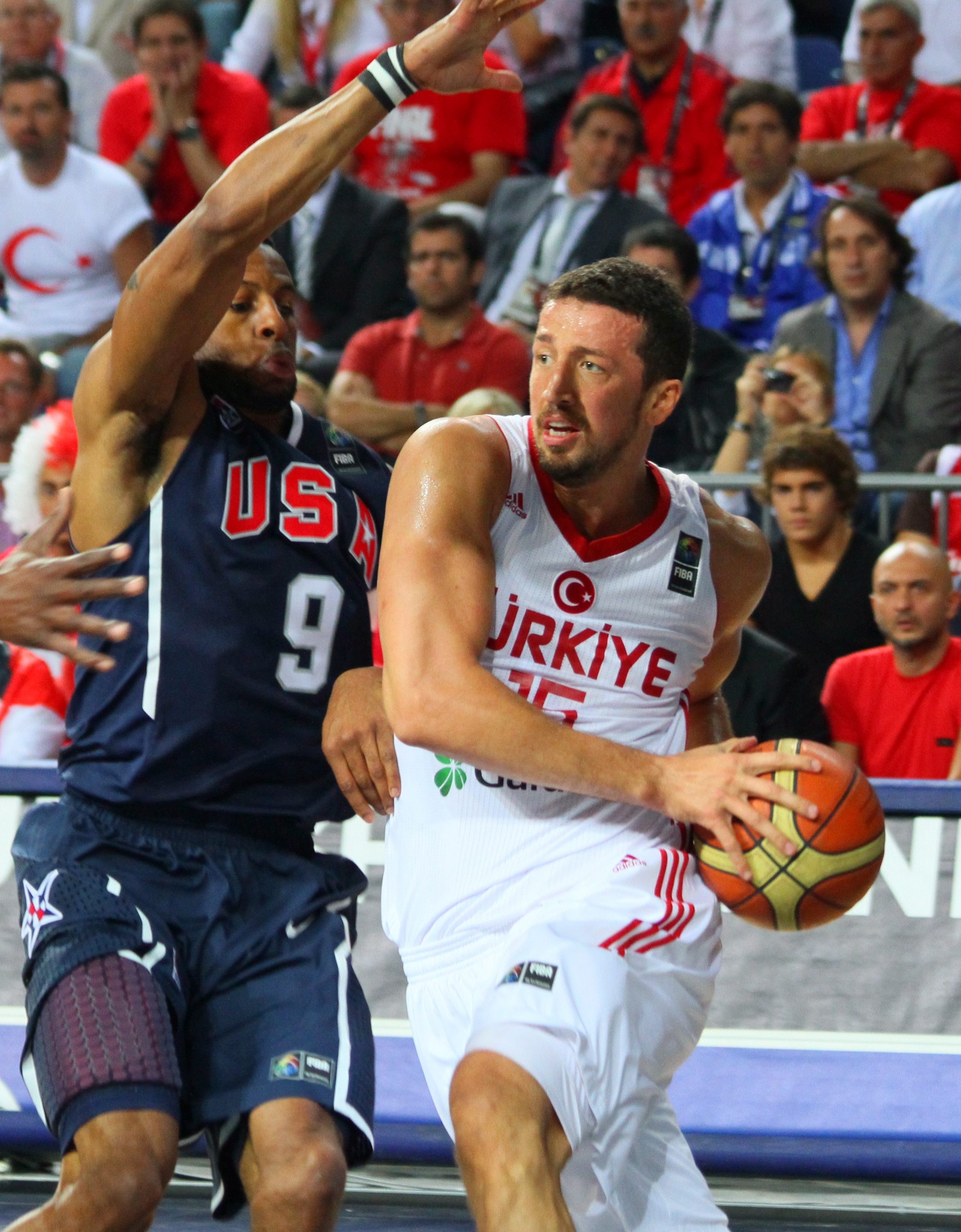 Basketball World Cup 2010 in Turkey - Hidayet Türkoğlu.